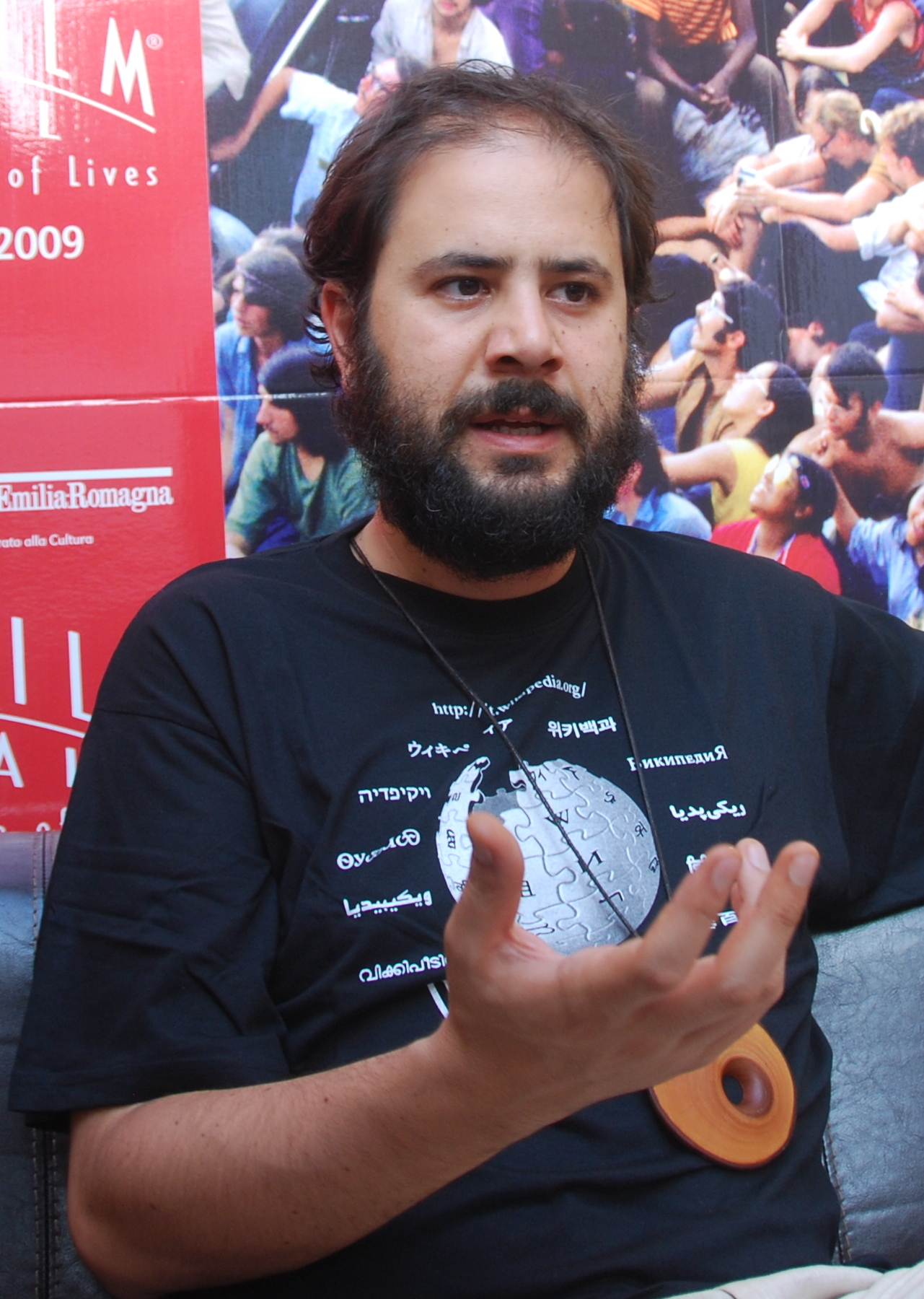 Andrea Romeo con una maglietta di Wikipedia al Biografilm Festival.